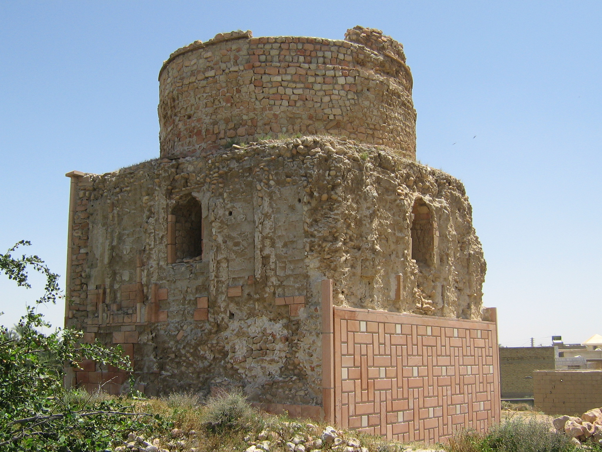 خنج - مقبره شعيب